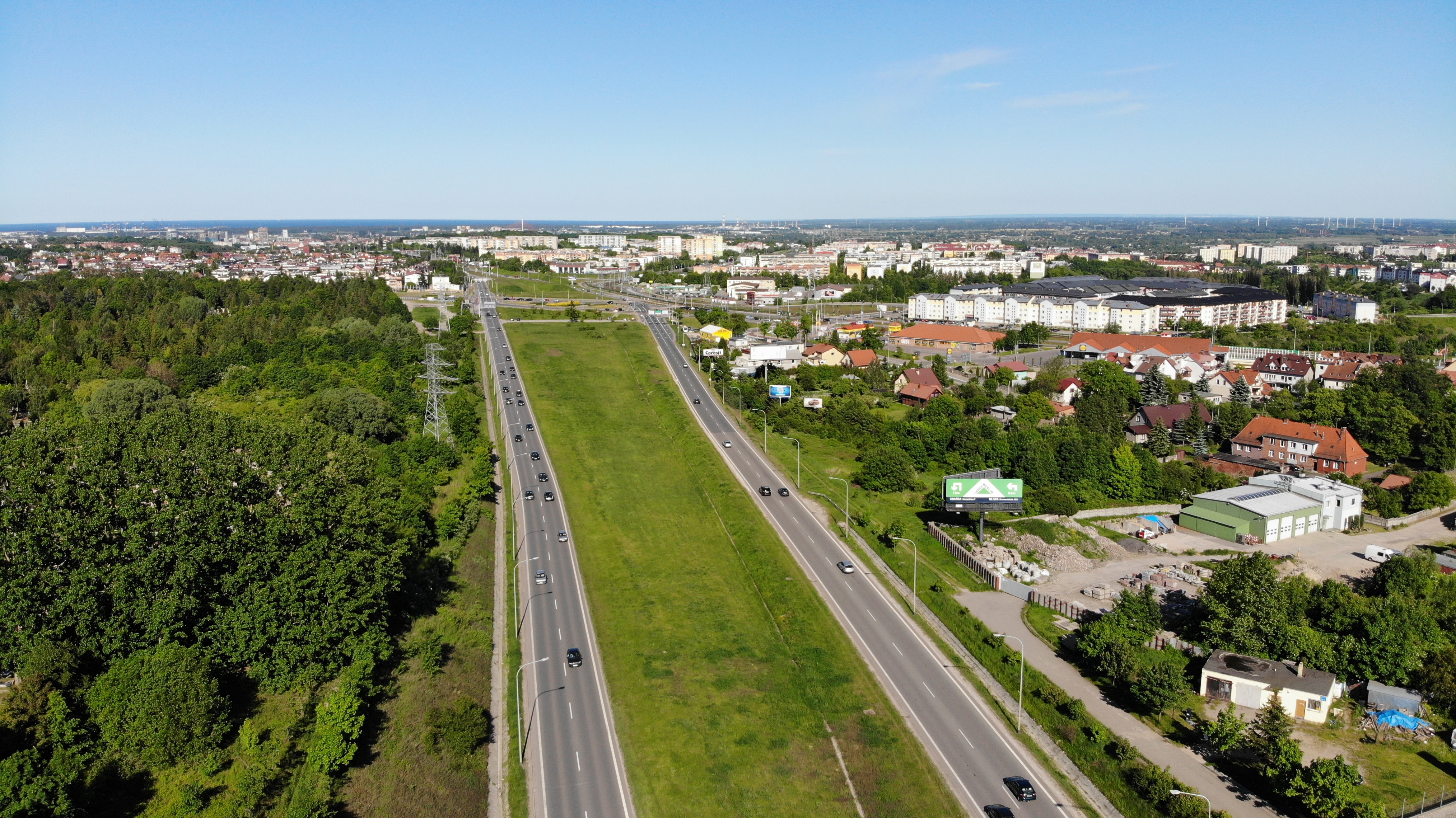 Aleja Armii Krajowej, widok w kierunku dzielnicy Chełm